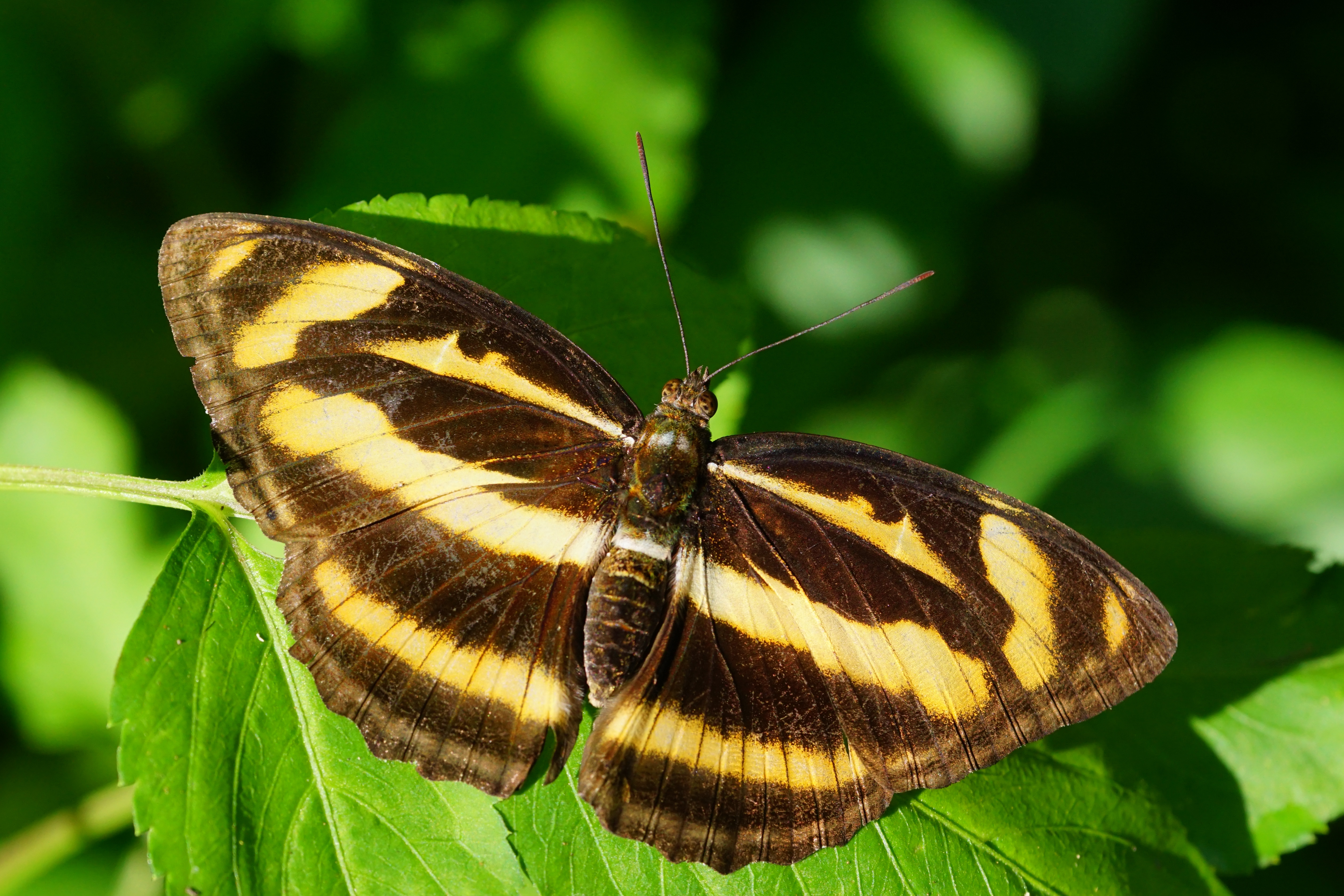 雙色帶蛺蝶 Athyma cama zoroastes